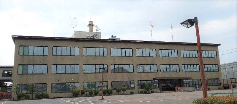 富山県砺波総合庁舎